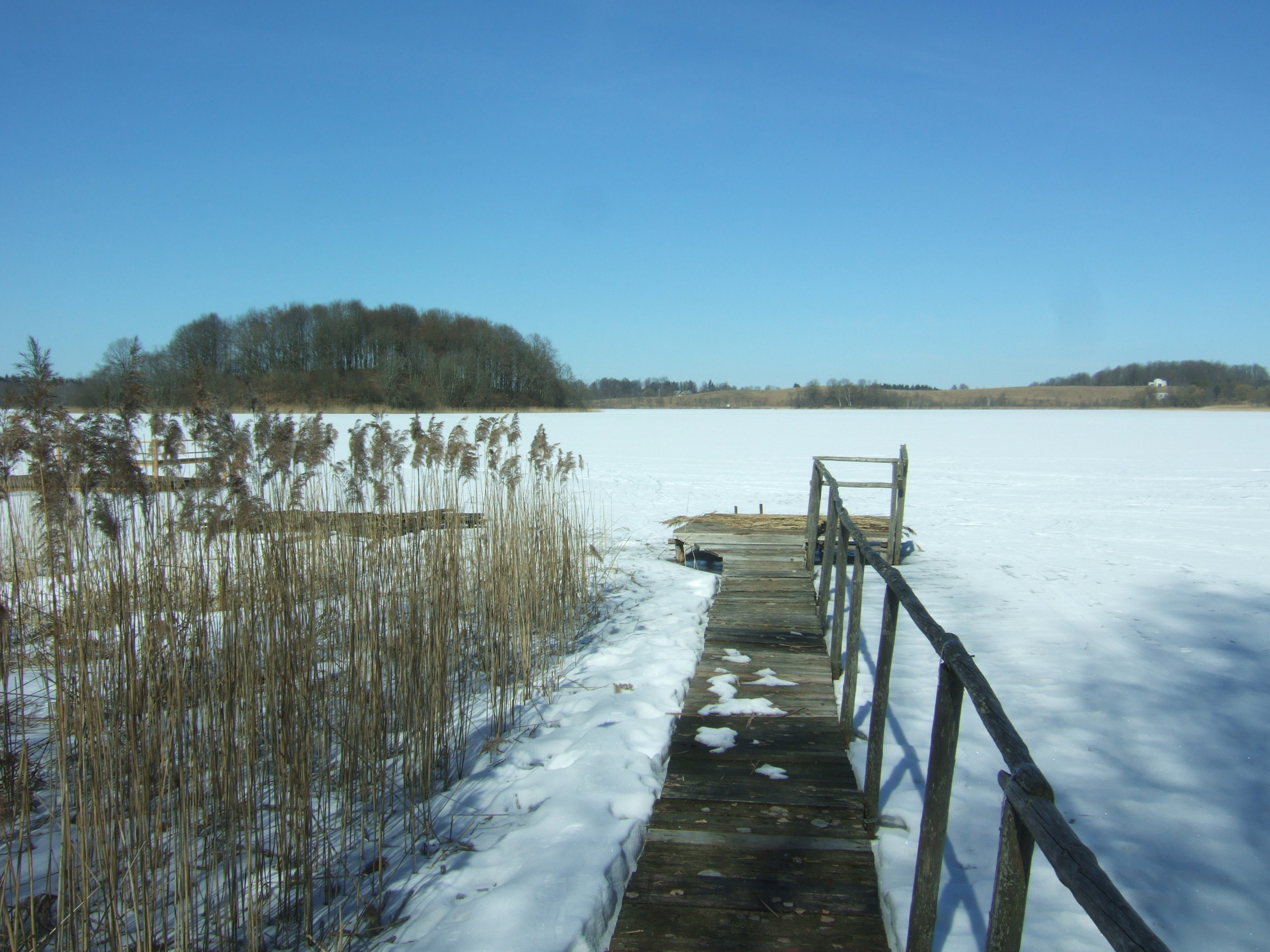 Riešės ežeras (Vilniaus raj.)